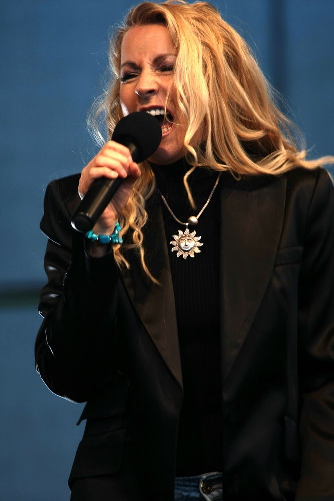 Lian Ross podczas występu w Janikowie, k. Inowrocławia